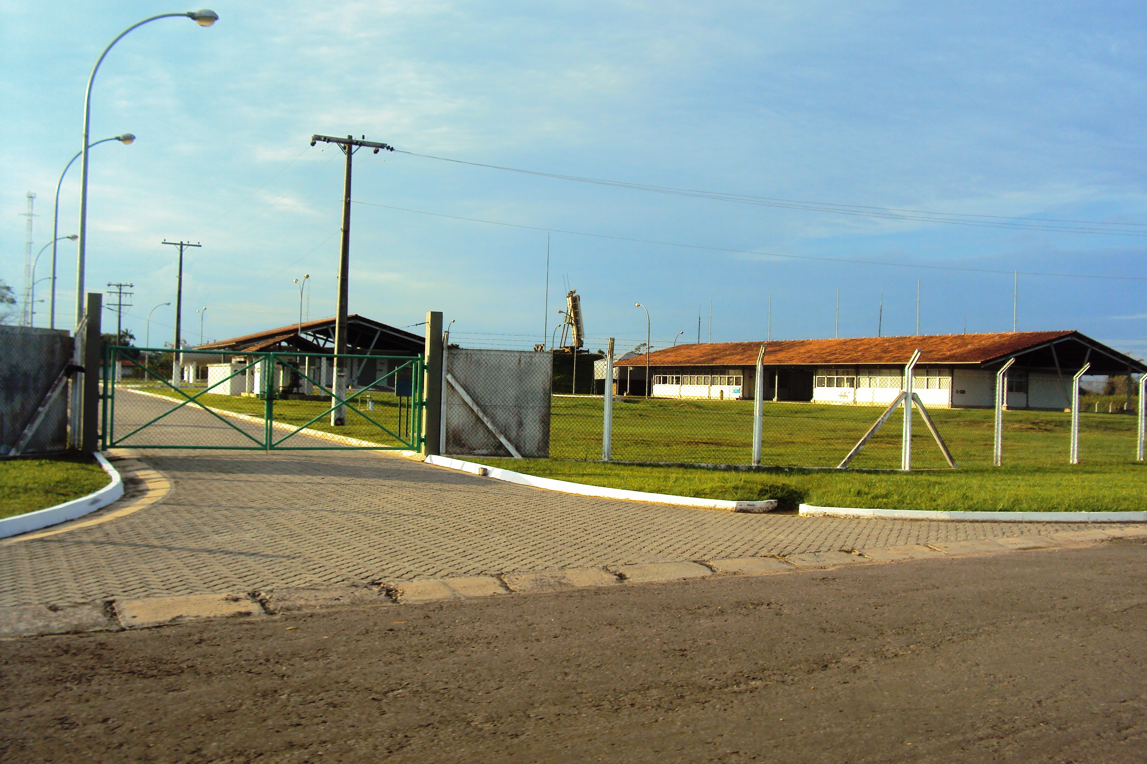 Aeroporto de Eirunepé, Brasil